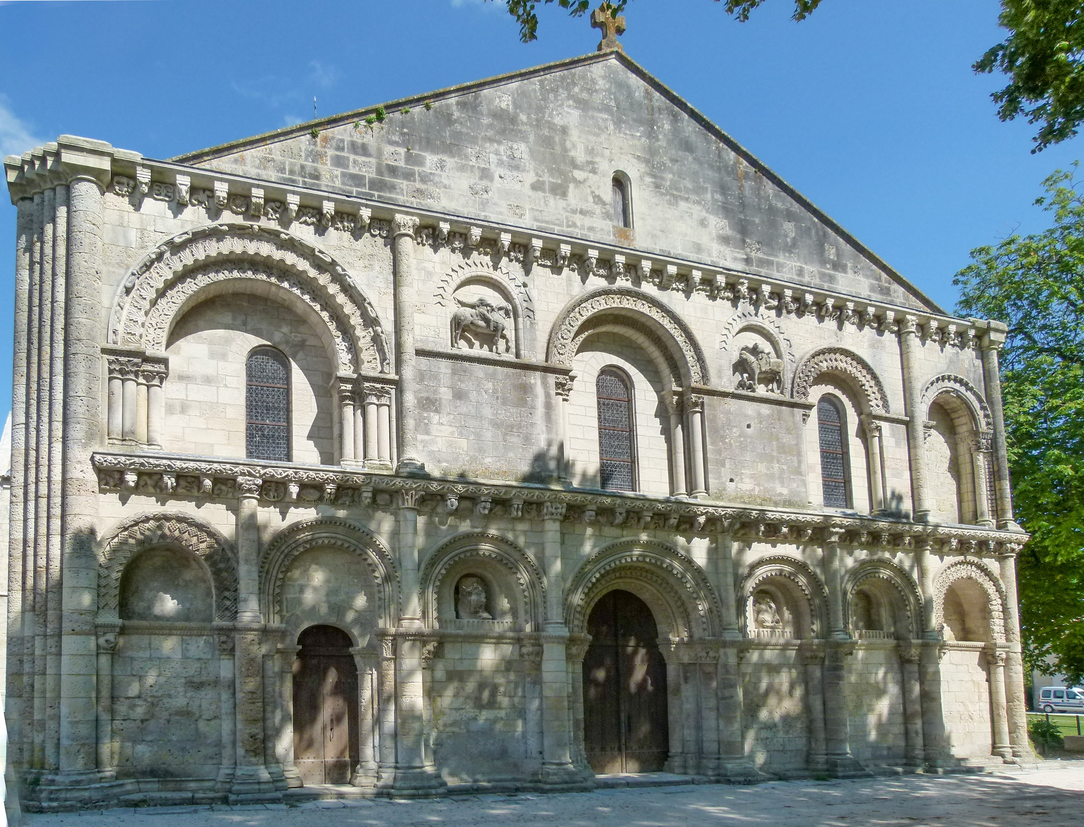 Vue de la façade sud de l'église Notre-Dame de Surgères.